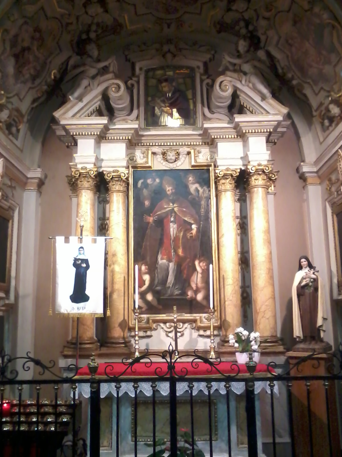 Cappella di San Gottardo nella chiesa di San Nicolao nel Santuario di Corbetta (MI) - Italy